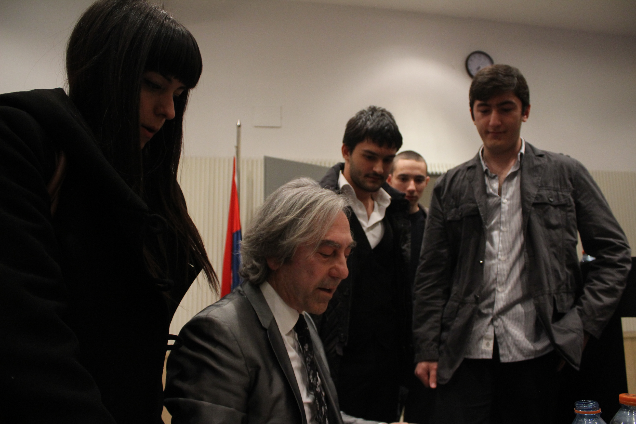 Tanrılar Okulu'nun yazarı Stefano D'Anna, Bilkent Üniversitesi Tasarım ve Mimarlık Topluluğu'nun düzenlediği TasarımBilkent'teki konferansı sonrası hayranları ile.